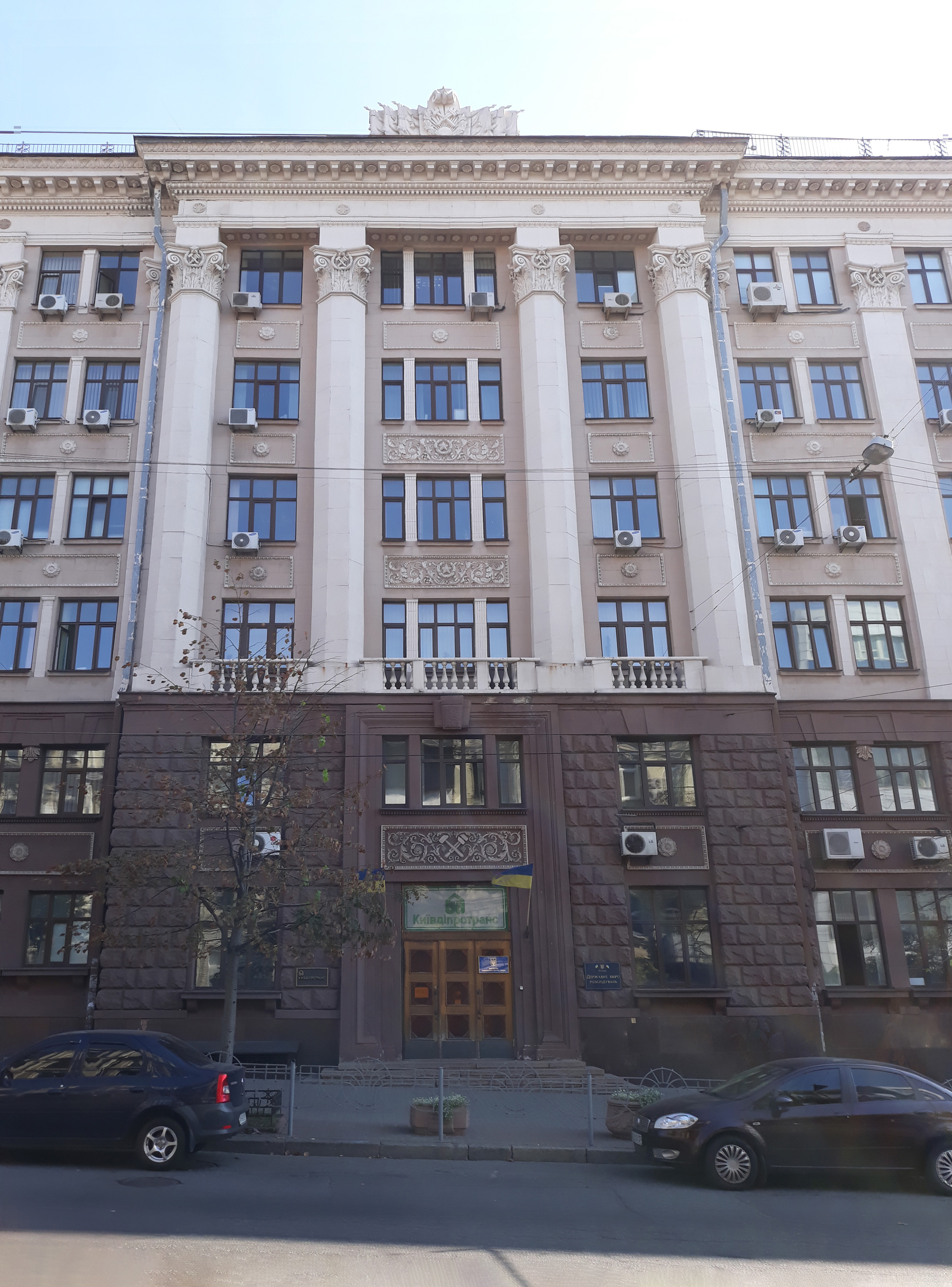 м. Київ, вулиця Симона Петлюри, 15. Державне бюро розслідувань